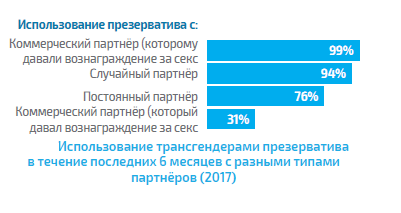 Использование трансгендерами презерватива в течение последних 6 месяцев